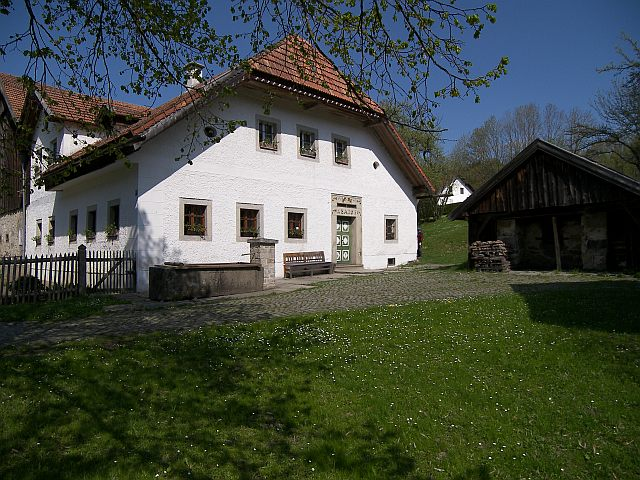 Webereimuseum Breitenberg im Ortsteil Gegenbach